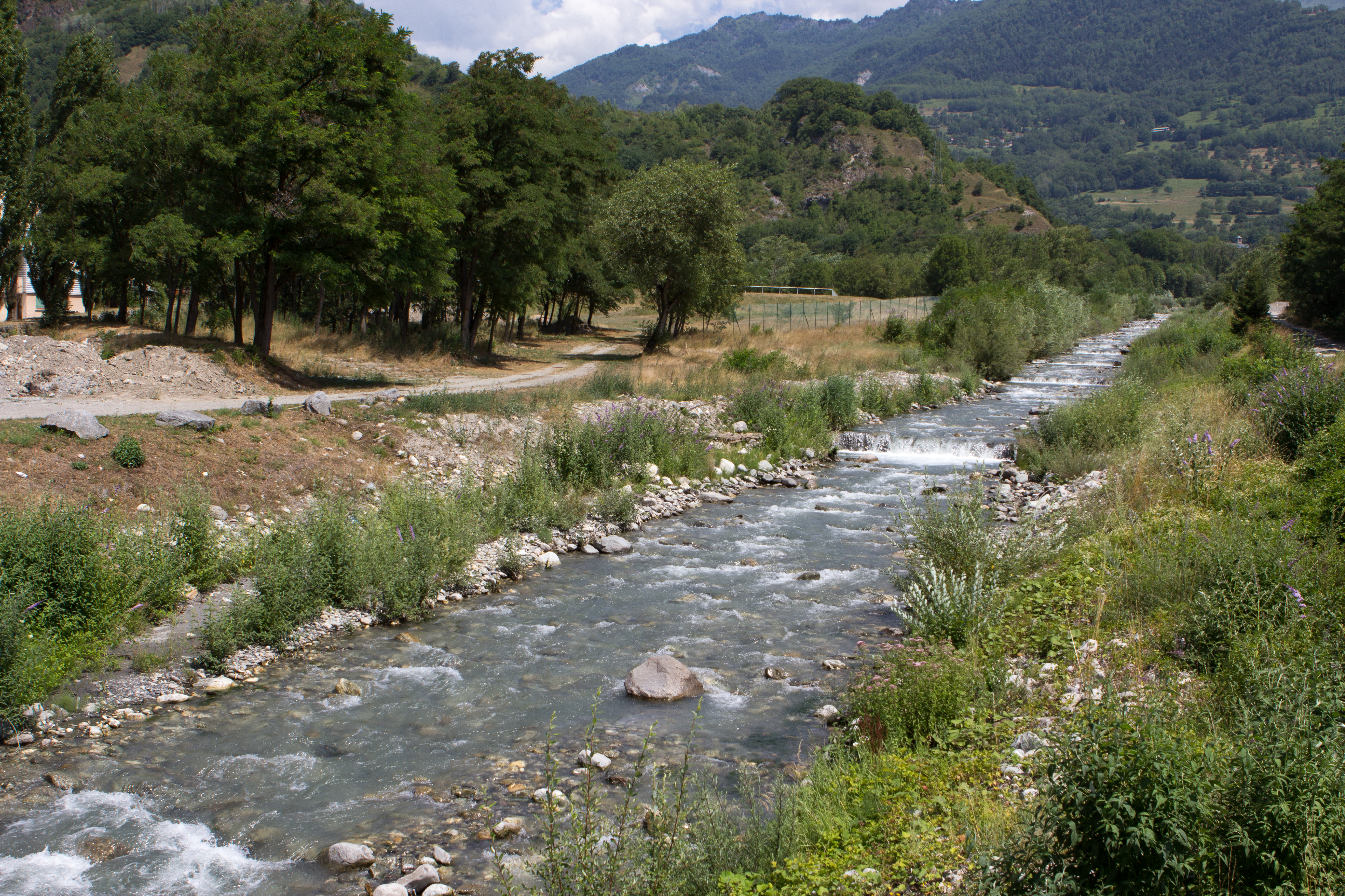 La rivière le Bugeon / La Chambre / Savoie / France